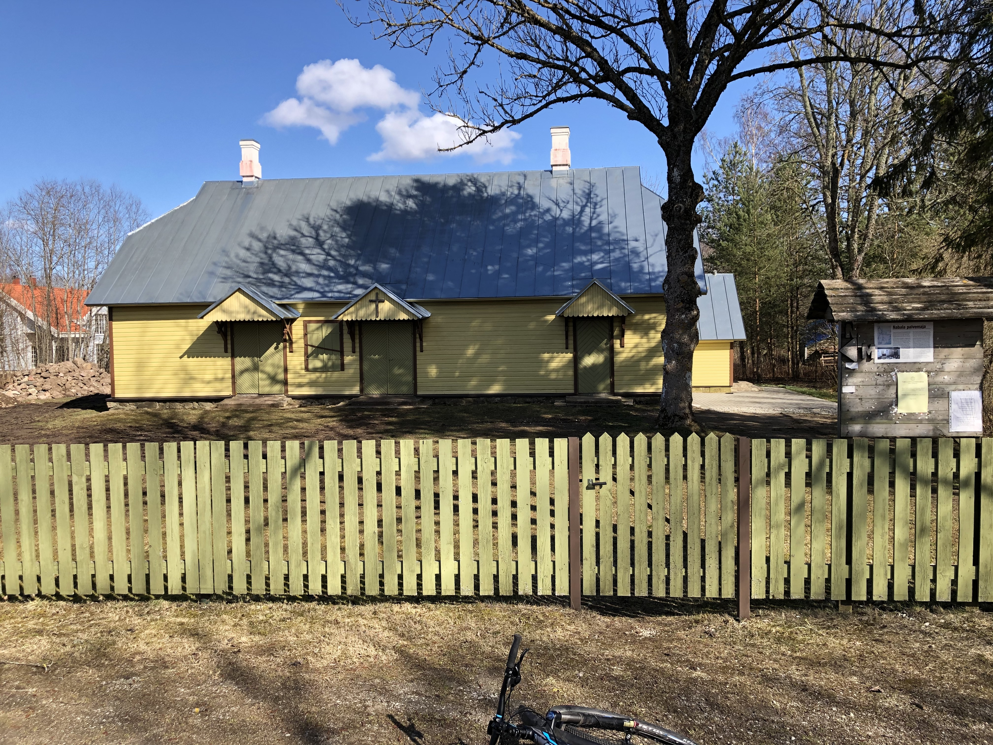 Palvemaja Paeknas